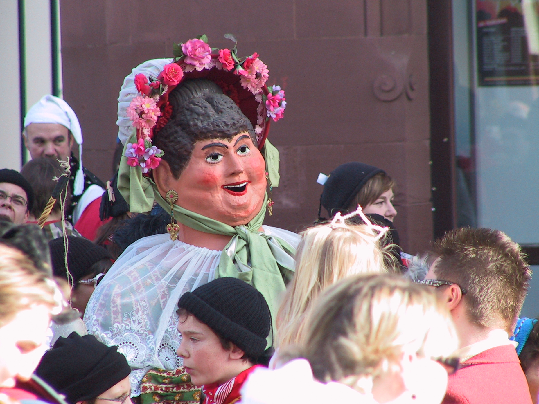 Die Riesendame ist eine der traditionsreichen Einzelfiguren der Fastnacht in Wolfach im Schwarzwald. Fasnetsdienstag 2007.